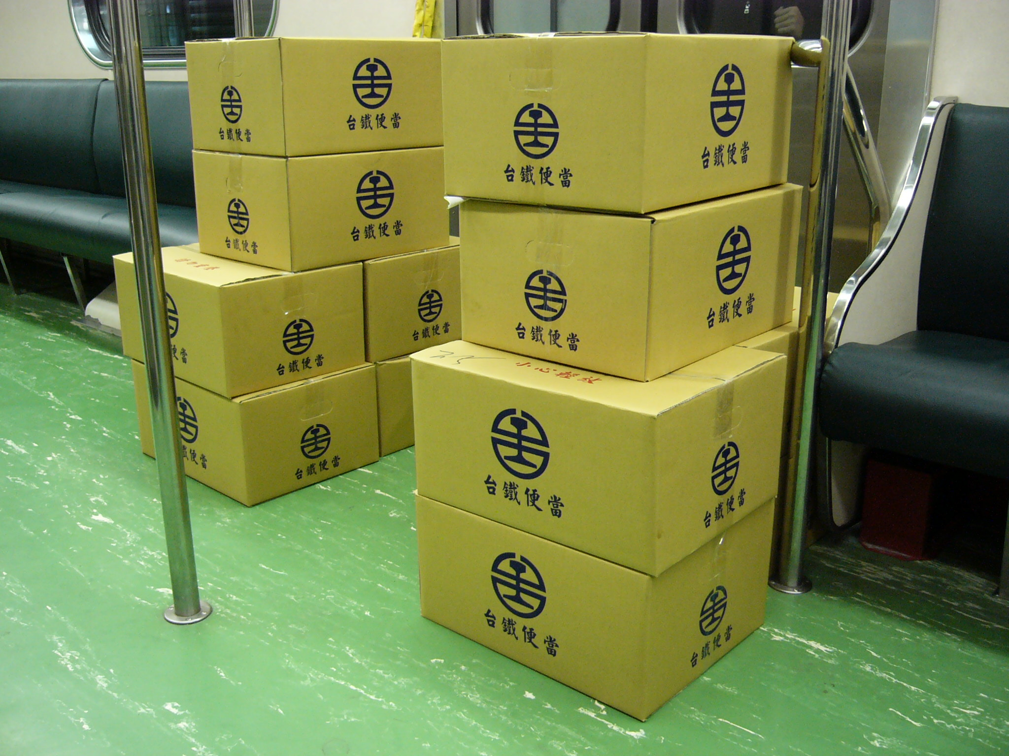 臺灣鐵路管理局EMU600型電聯車車廂EMC610車門內側堆置的台鐵便當12箱。